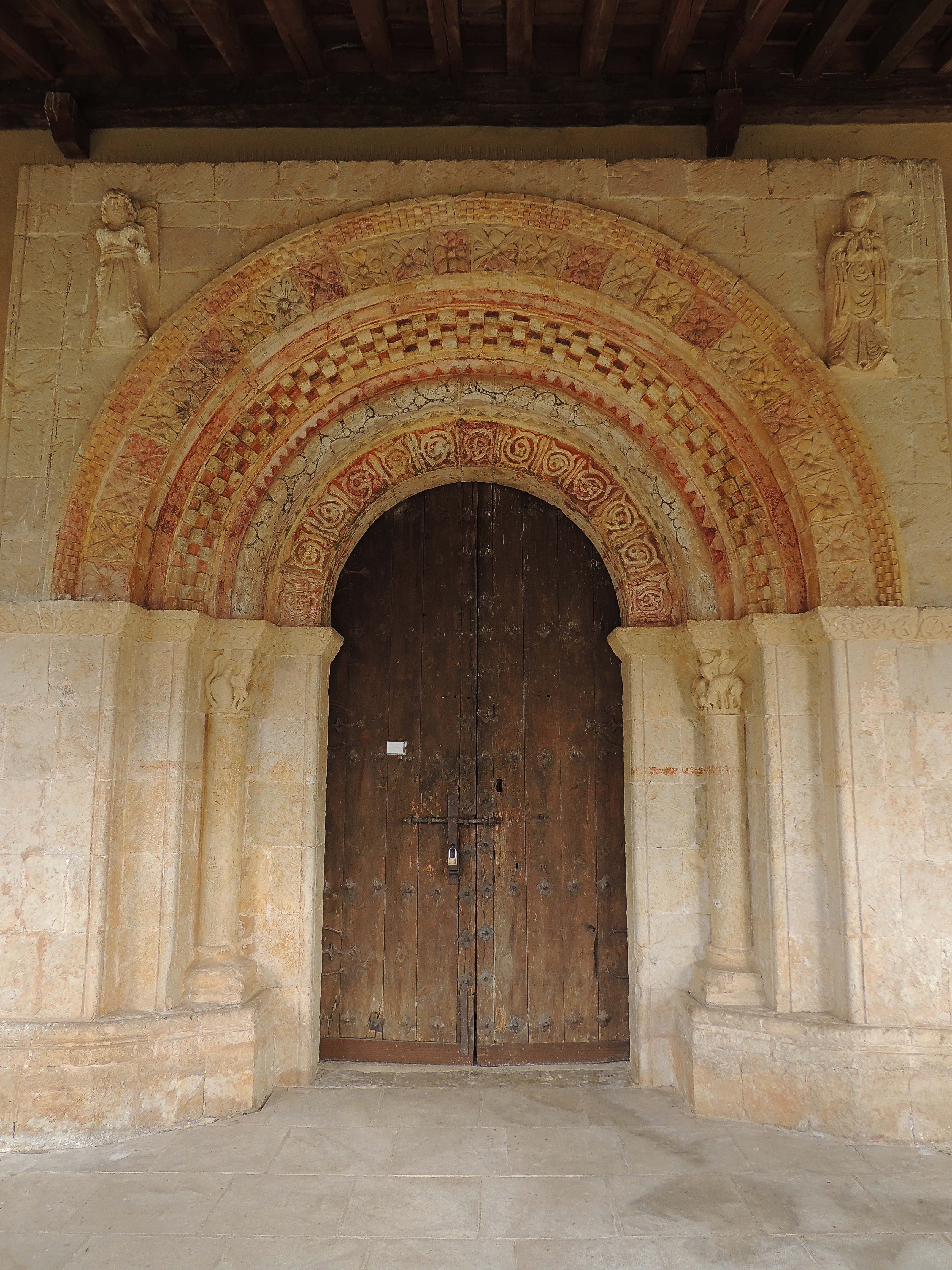 Portada de la iglesia de Nuestra Señora de las Vegas en Requijada